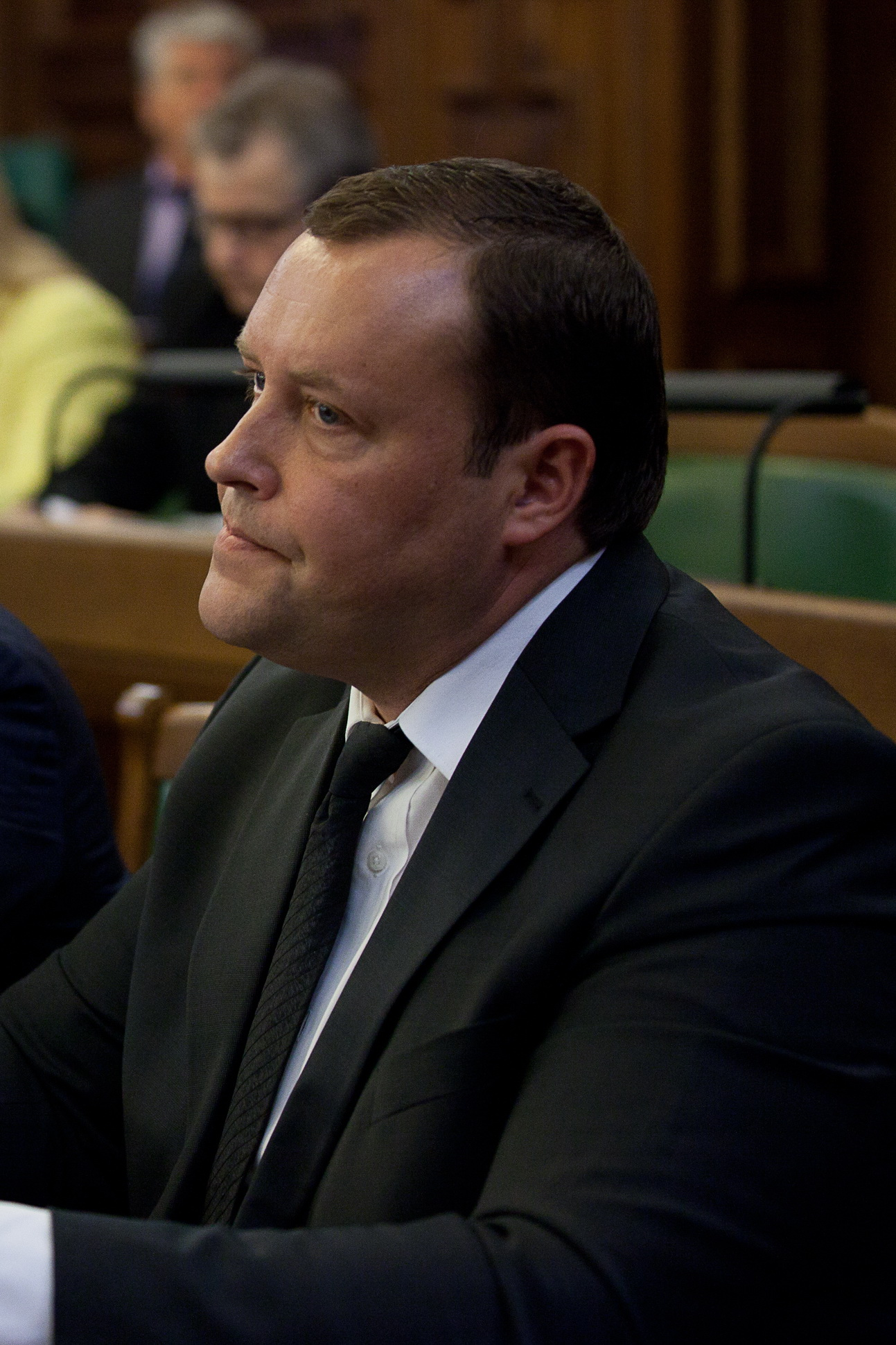 Rihards Kozlovskis